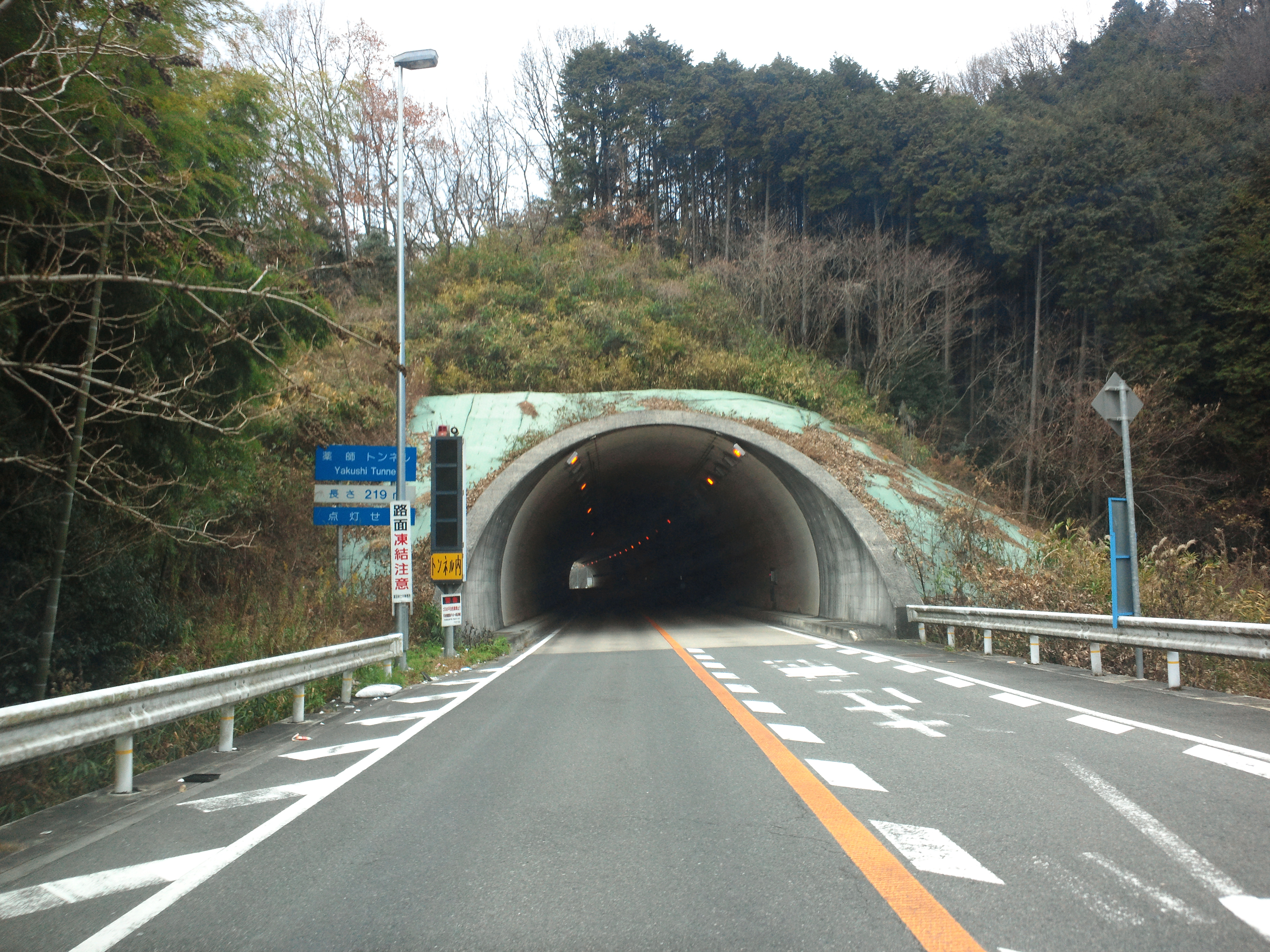 国道371号 薬師トンネル（南口側） 大阪橋本道路 石仏バイパス